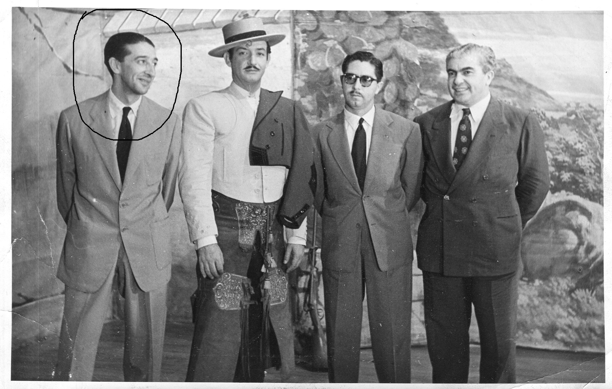 David Jato junto a Jorge Negrete durante la filmación de una de sus películas.